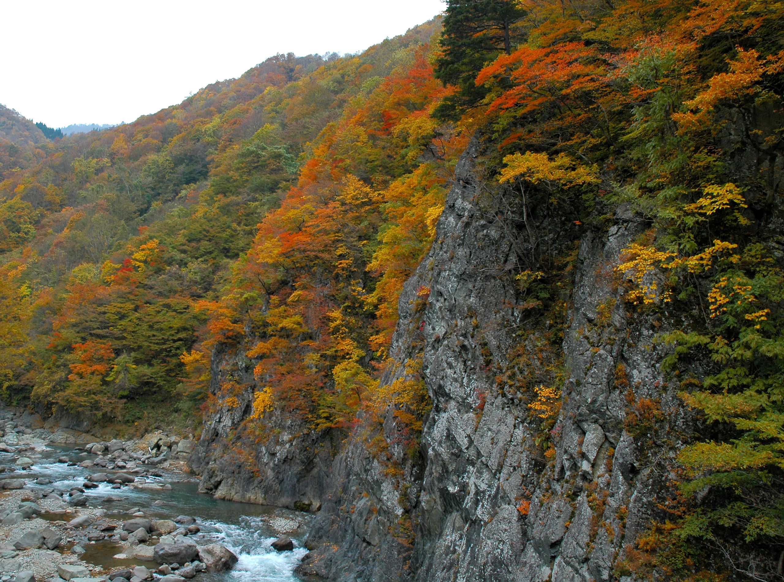 Akiyamago (秋山郷, one of 日本の秘境100選)